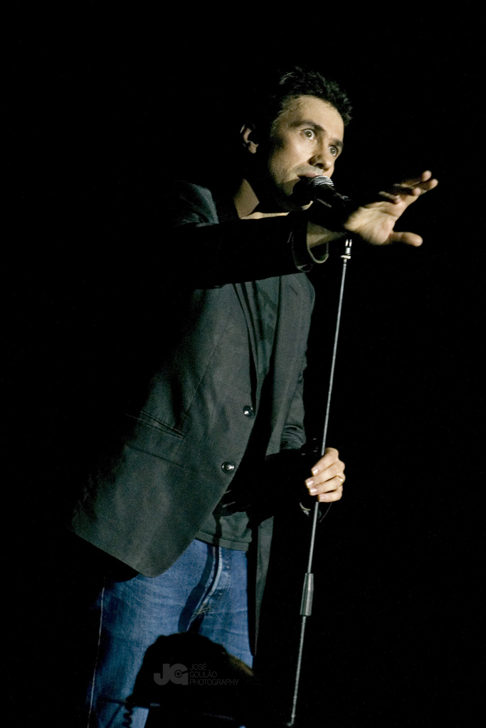 David Fonseca é um músico português. É difícil imaginar pela cara dele... mas tinha 4000 pessoas a rir à sua frente :oD